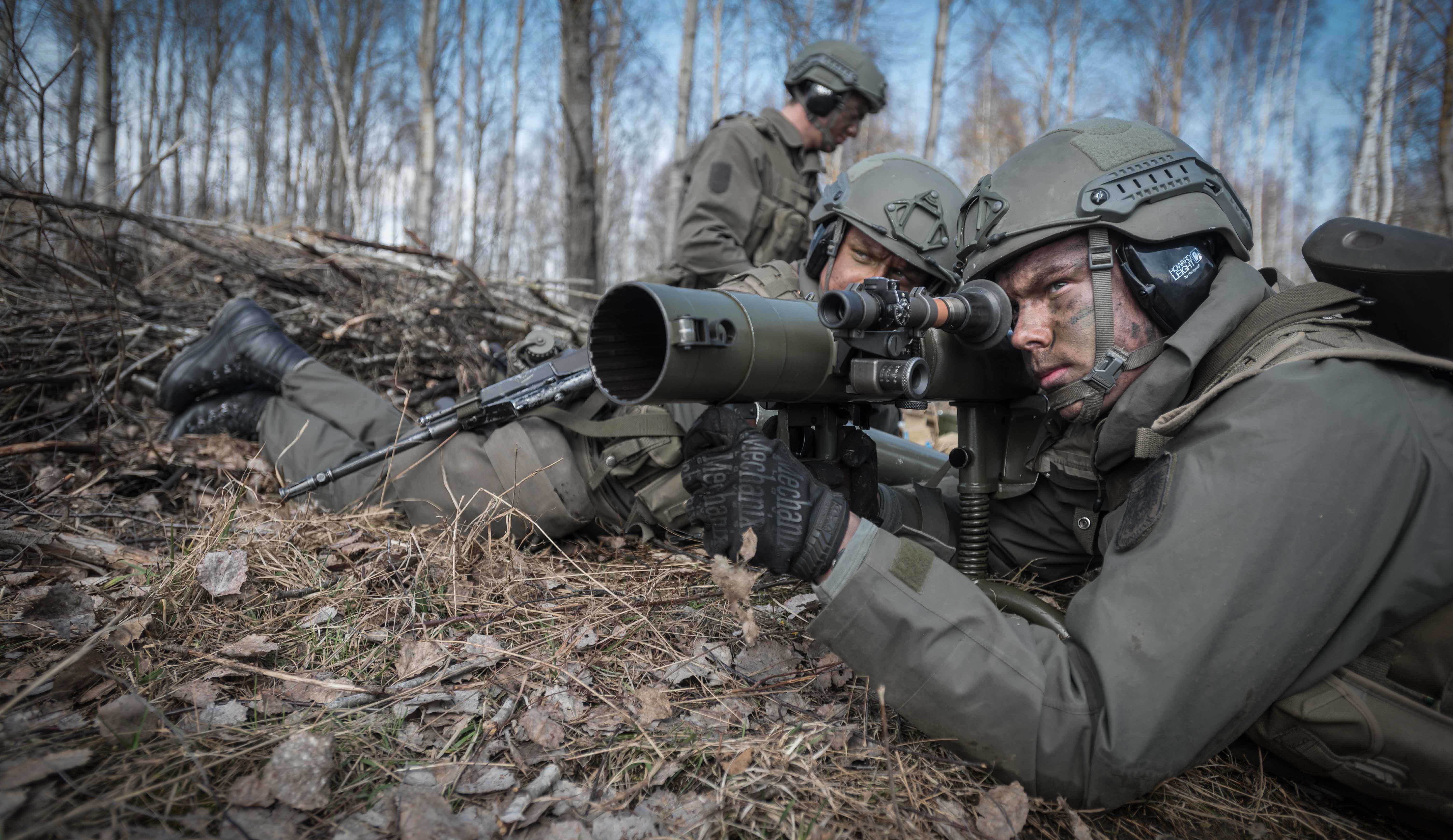 Der Richtschütze hat das Ziel anvisiert.